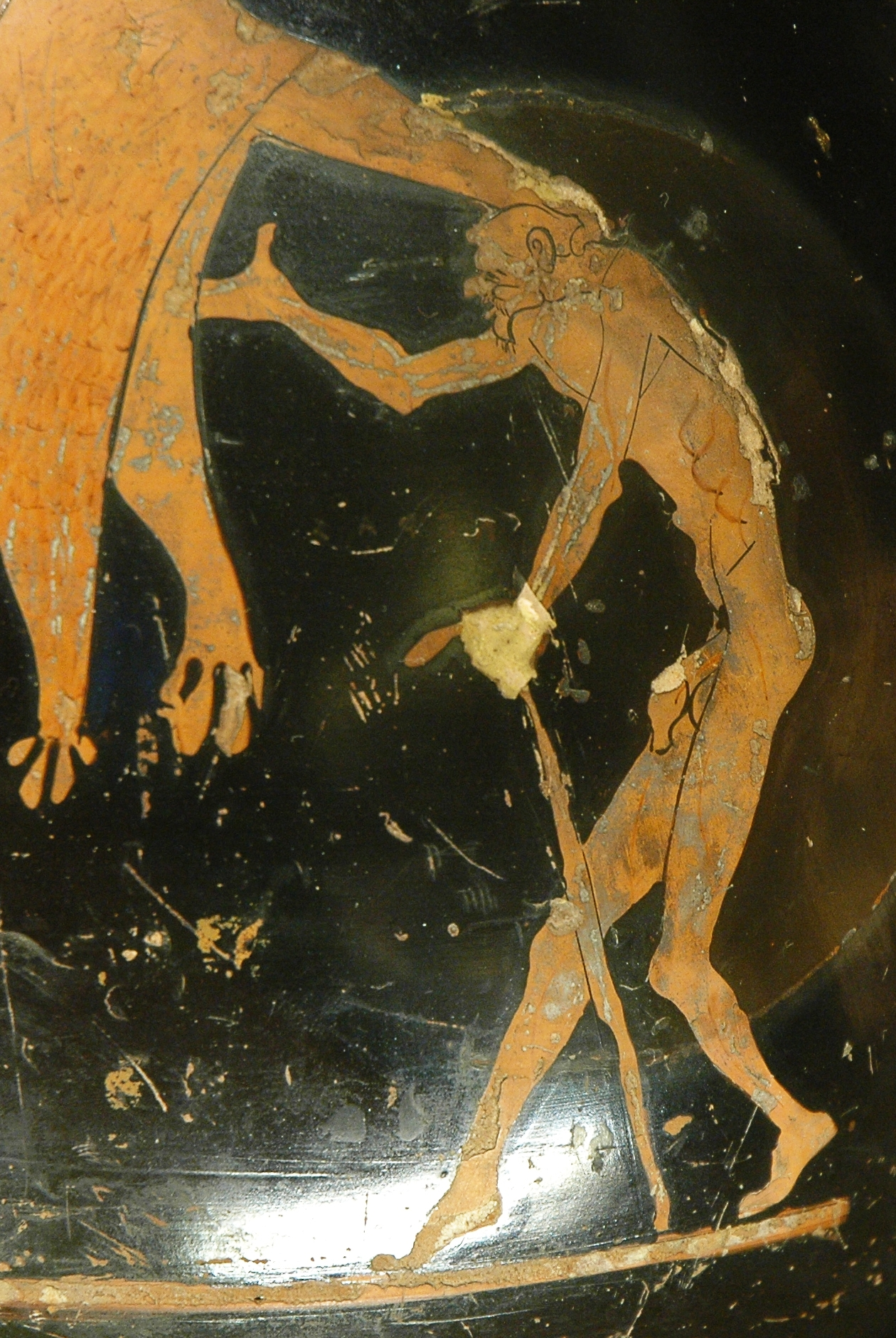 Geras, son of Nyx and the personification of old age. Detail from an Attic red-figure pelike, ca. 480 BC–470 BC.